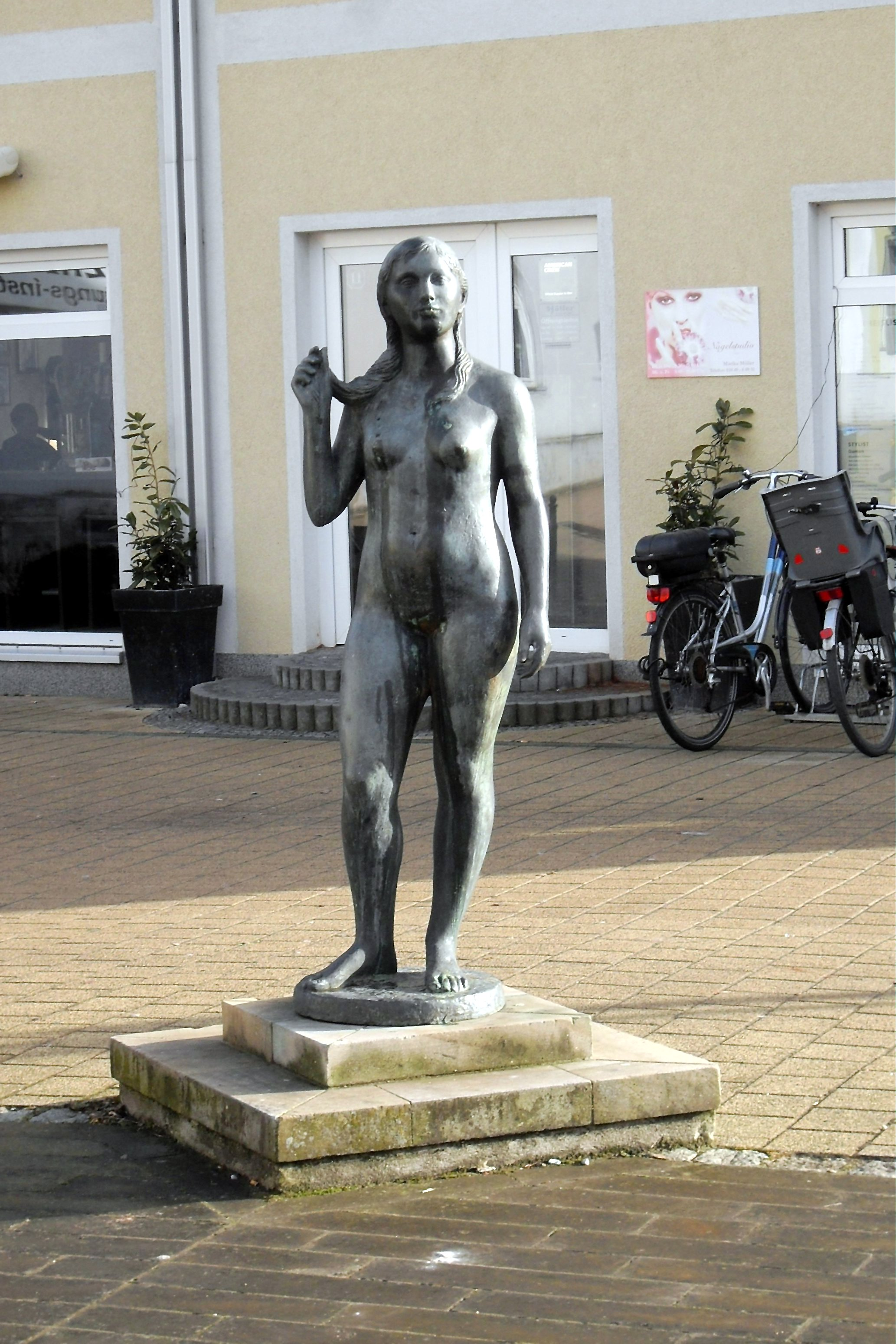 Bronze statue Eva by Dieter Borchardt (1988) in Oschersleben, Germany